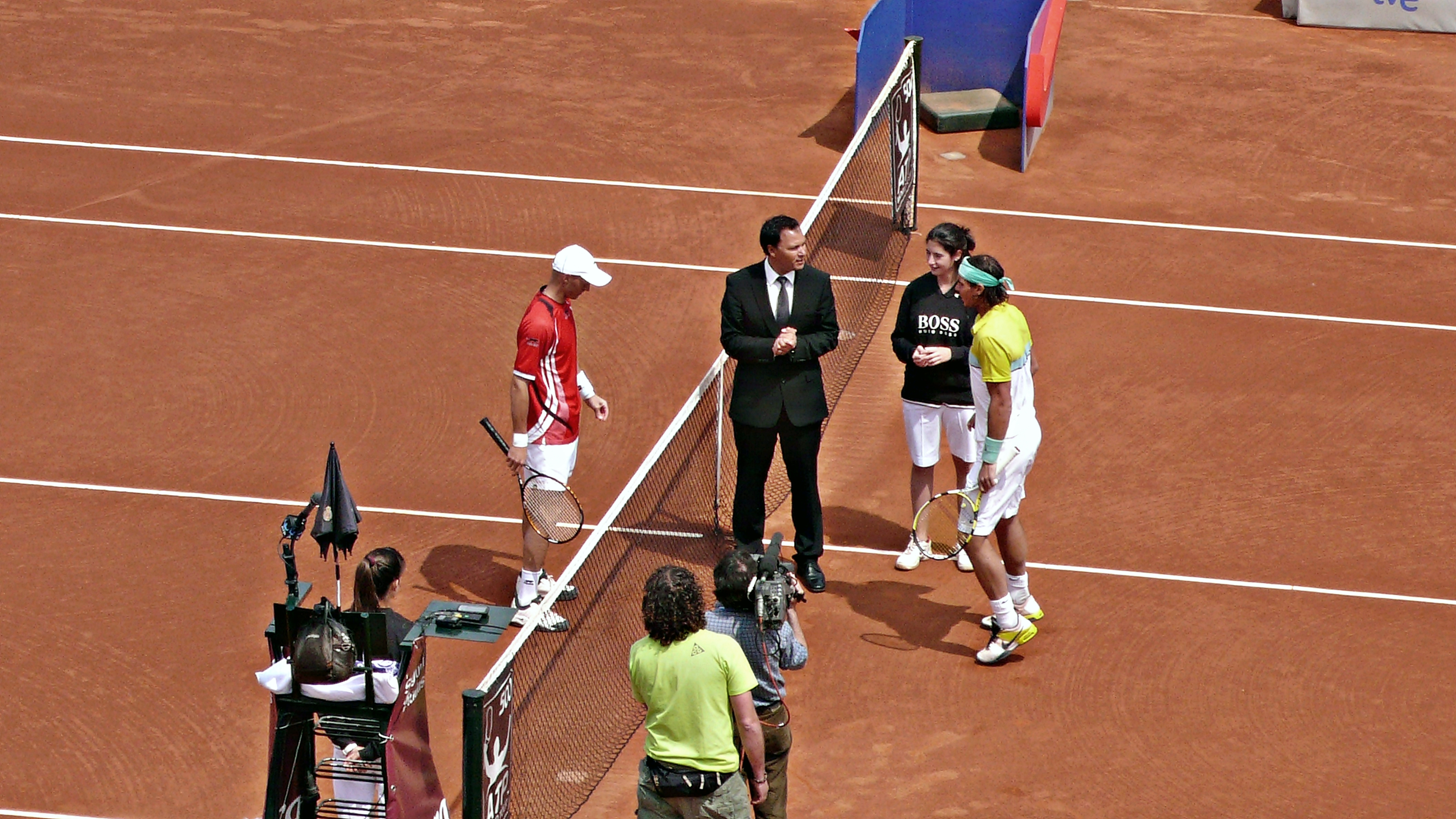 semifinales del barcelona open-rafa nadal-nikolay davydenko